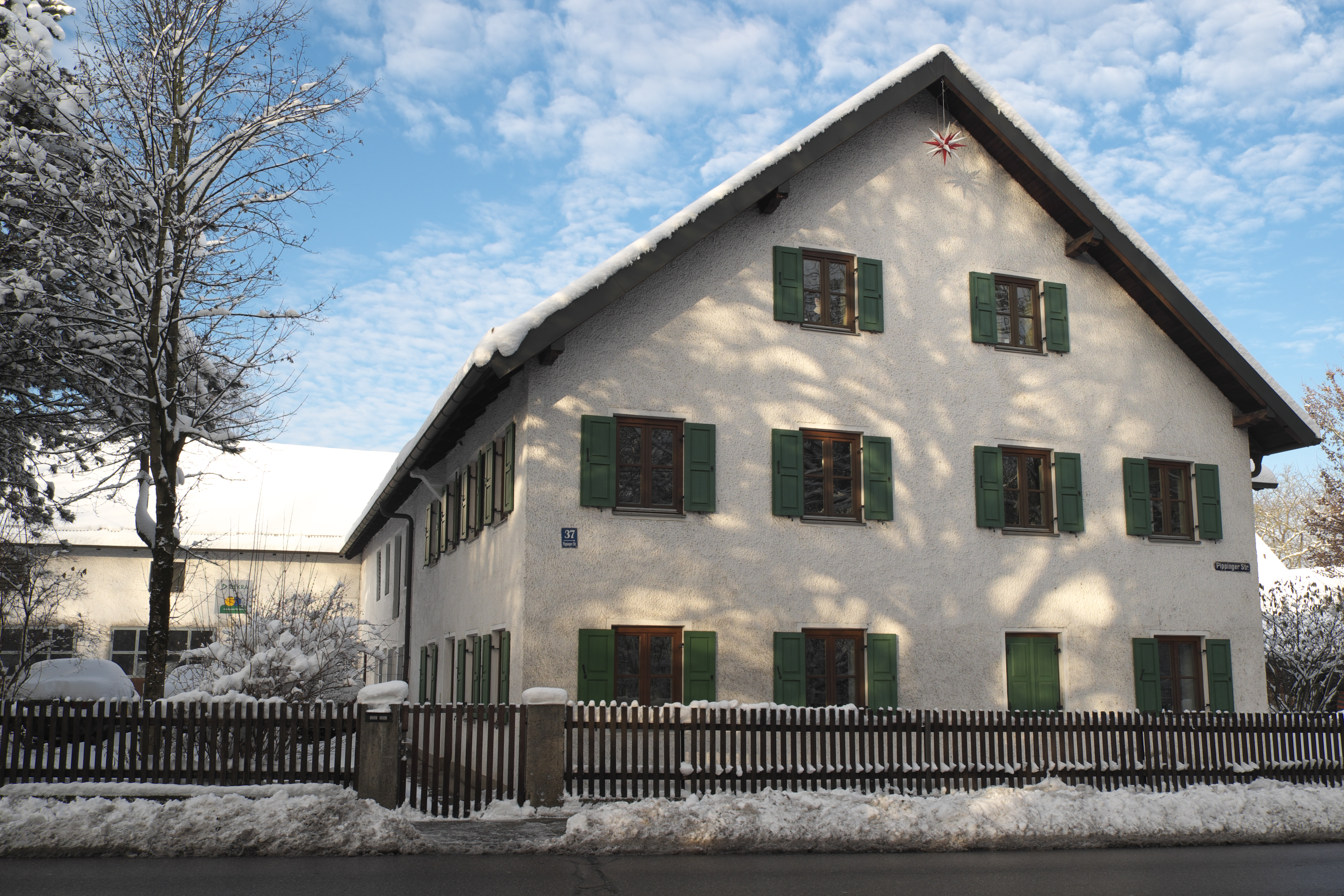 Ehemaliger Bauernhof in der Pippinger Straße 37 in Obermenzing im Stadtbezirk Pasing-Obermenzing in München (Bayern/Deutschland), erbaut im 19. Jahrhundert